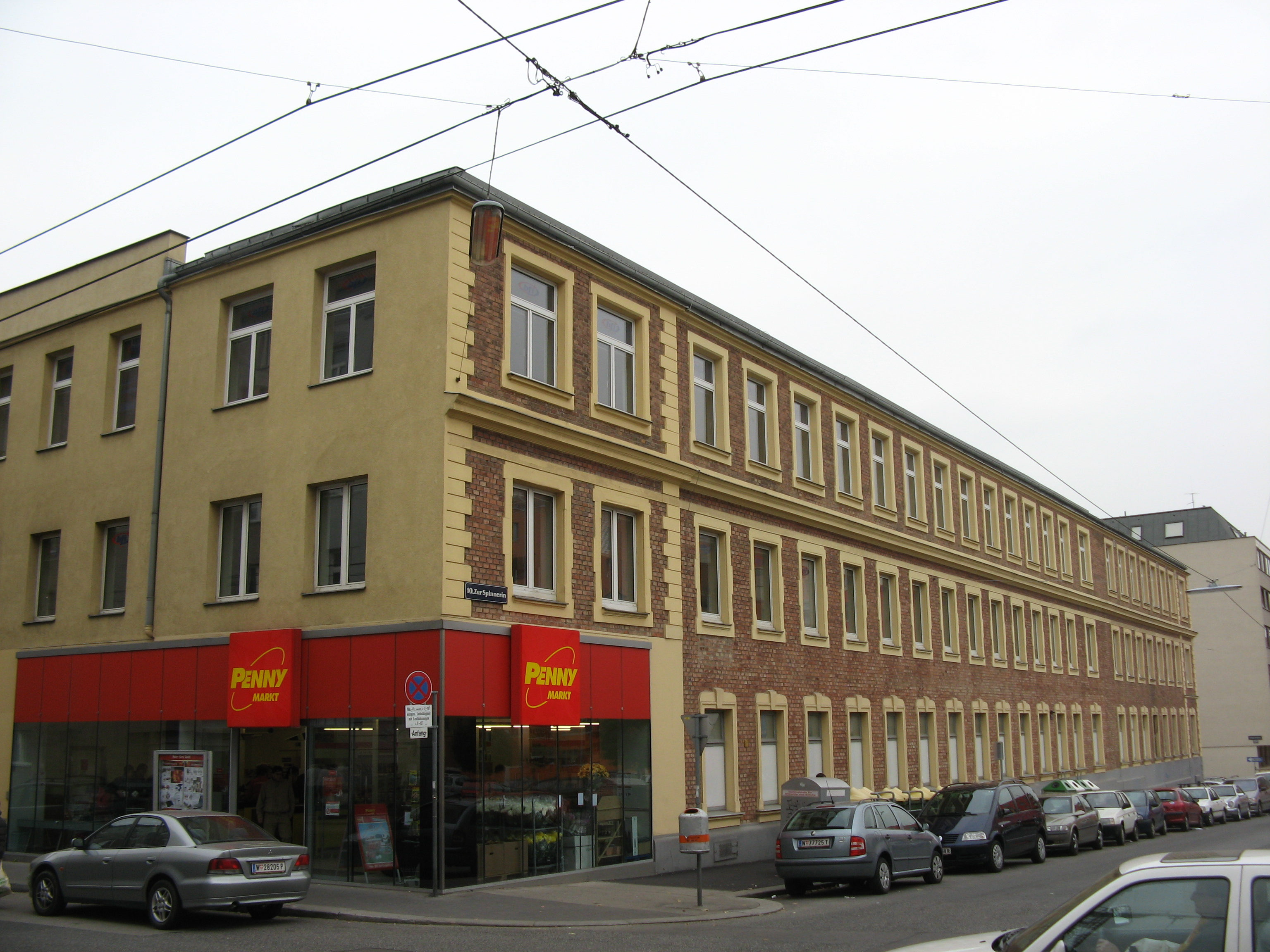 Ehemalige Zigarettenfabrik Abadie (1910), Davidgasse 92, Wien-Favoriten